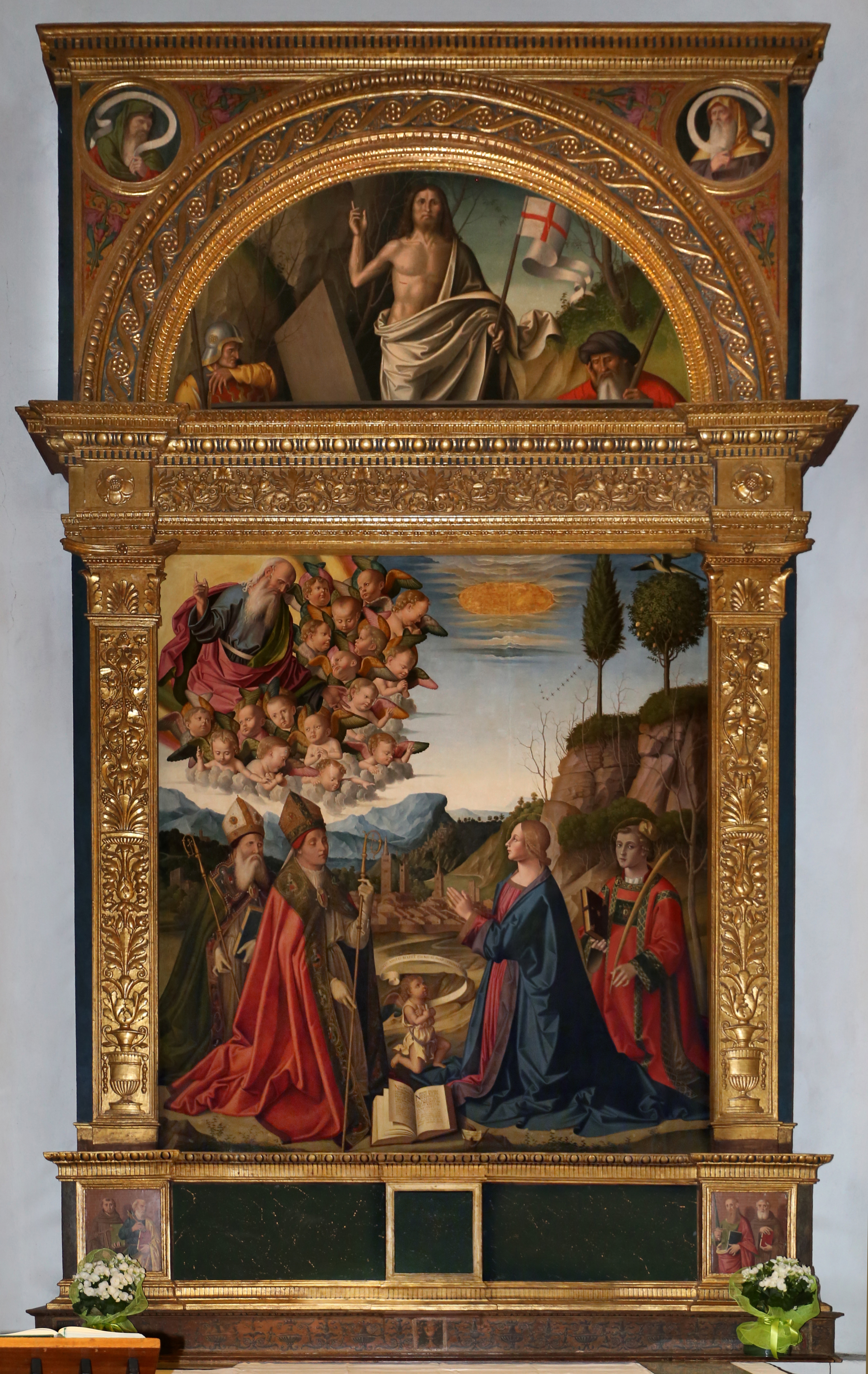 abbazia di San Mercuriale This is a photo of a monument which is part of cultural heritage of Italy.